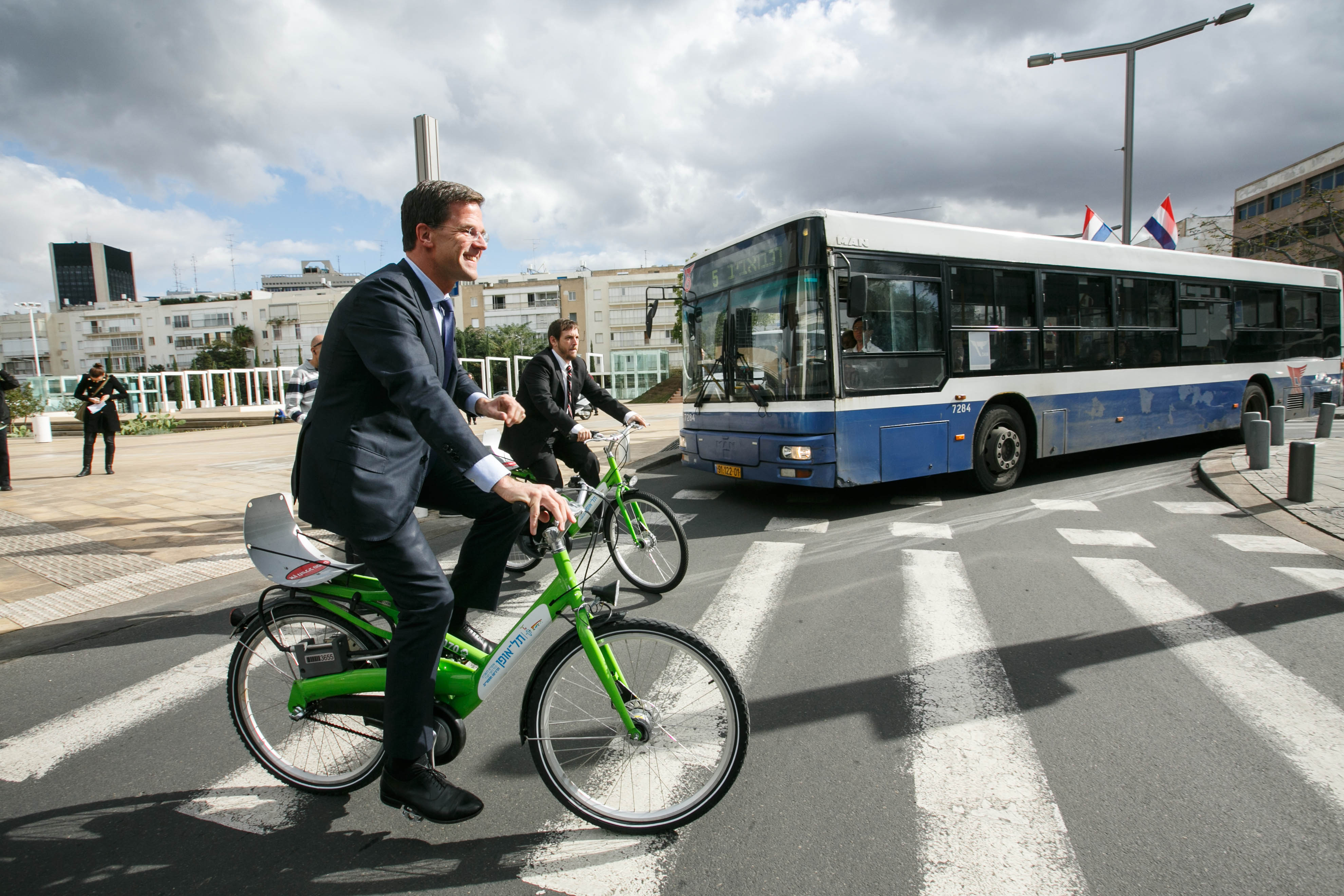 Minister-president Rutte maakt tijdens zijn bezoek aan Israël een fietstocht door Tel Aviv. Foto: Assaf Shilo